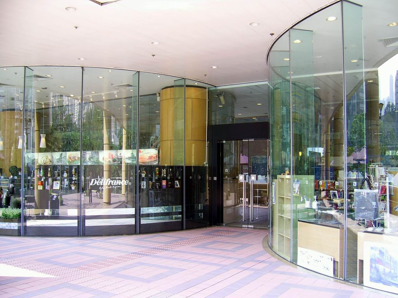 中文（香港）: 香港中央圖書館地面的Délifrance及禮品店